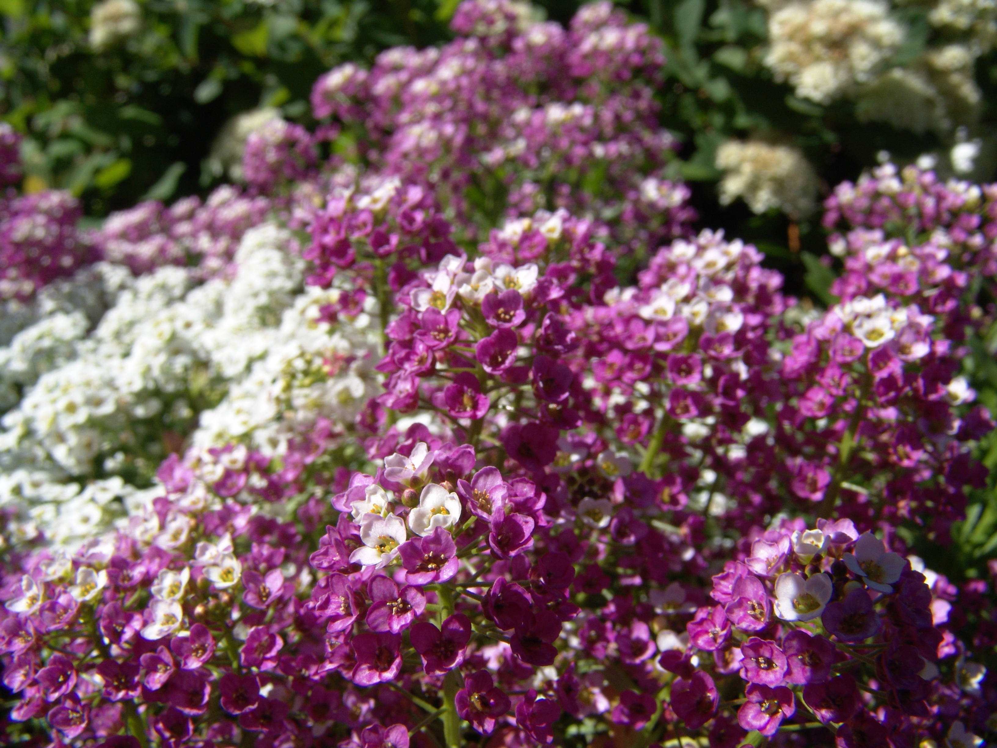 Island, Botanischer Garten Akureyri. Alyssum sp.